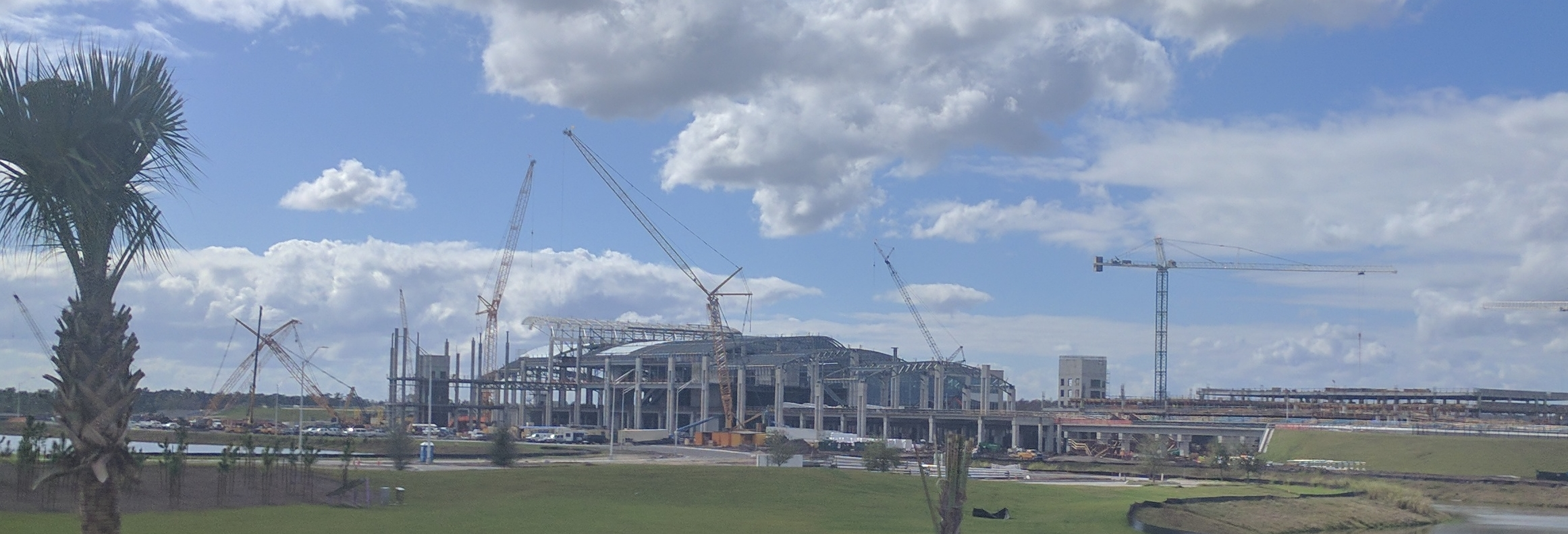 Orlando Intermodal Terminal